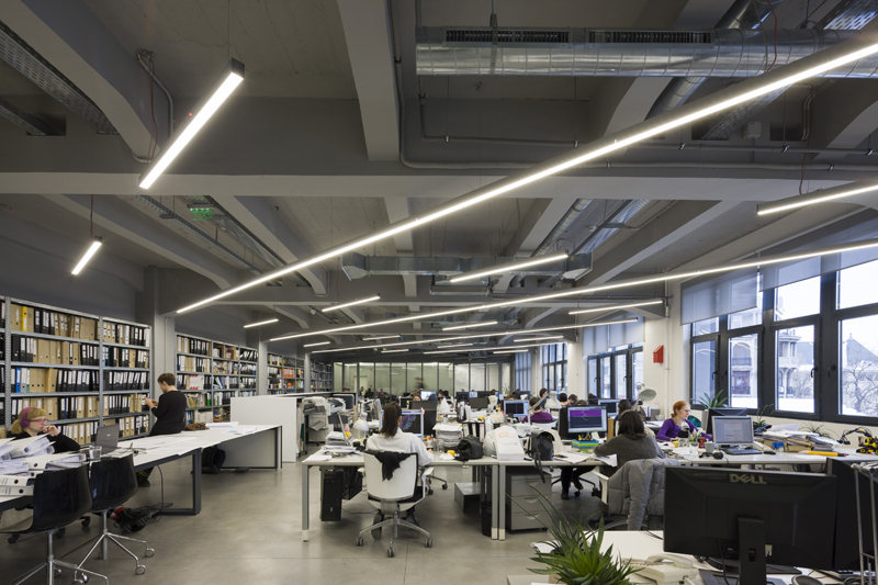 Biroul Cumulus